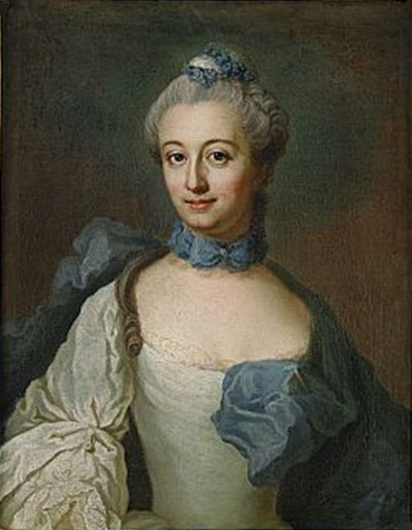 wife of Georg Gustaf Staël von Holstein